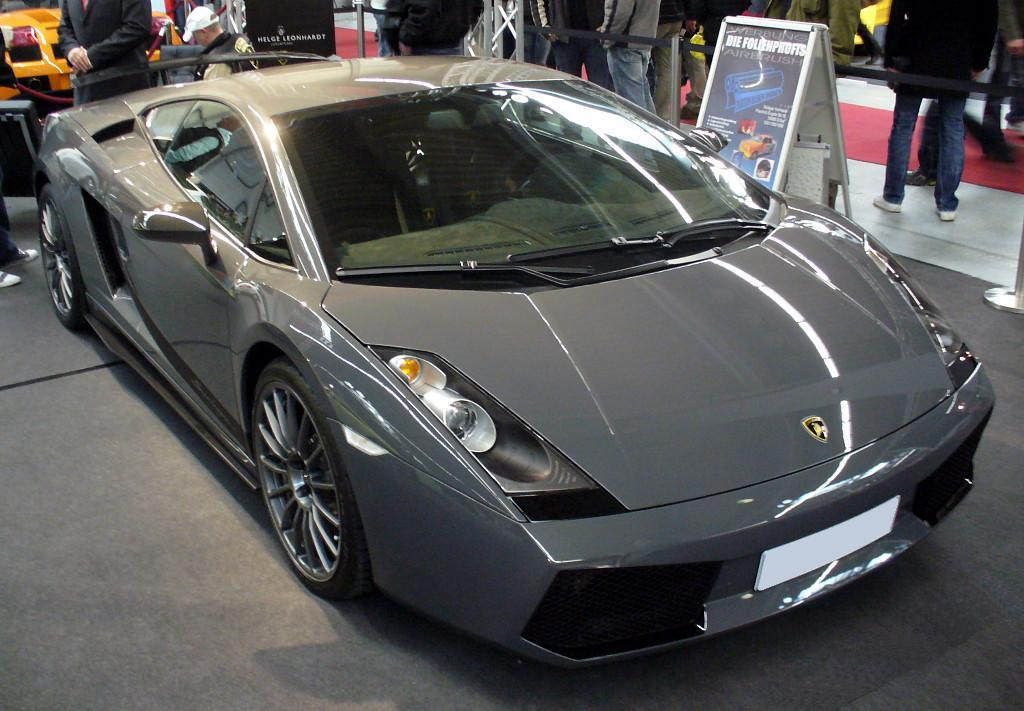 Lamborghini Gallardo Superleggera